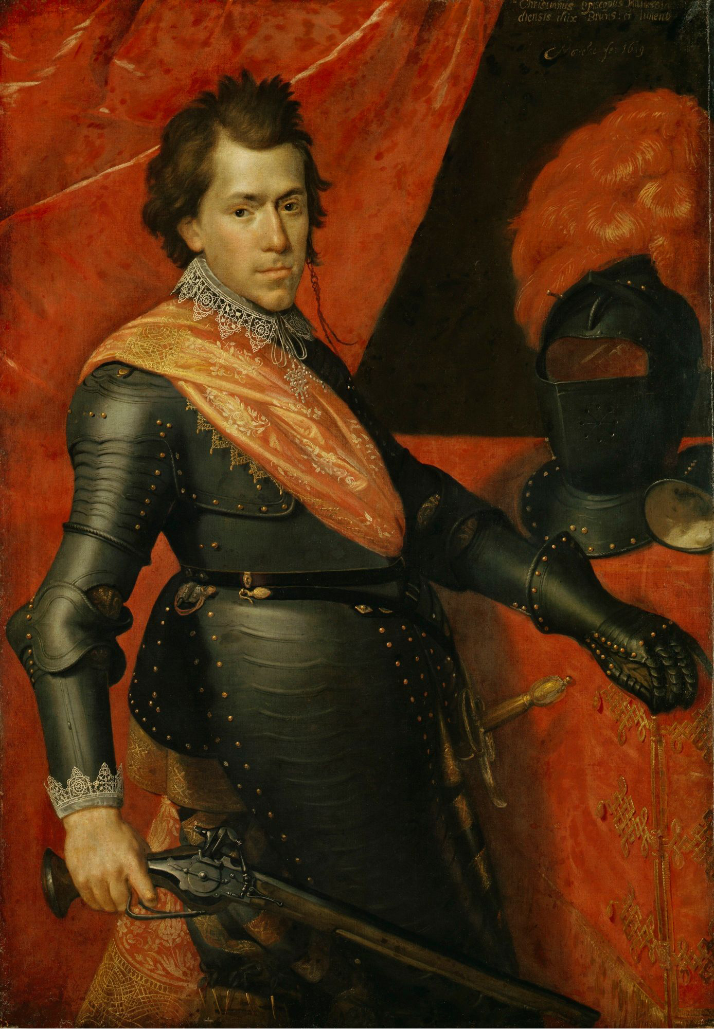 Das Gemälde von Paulus Moreelse zeigt den „tollen Christian“ im Kürisserharnisch zu Beginn seiner kriegerischen Laufbahn.